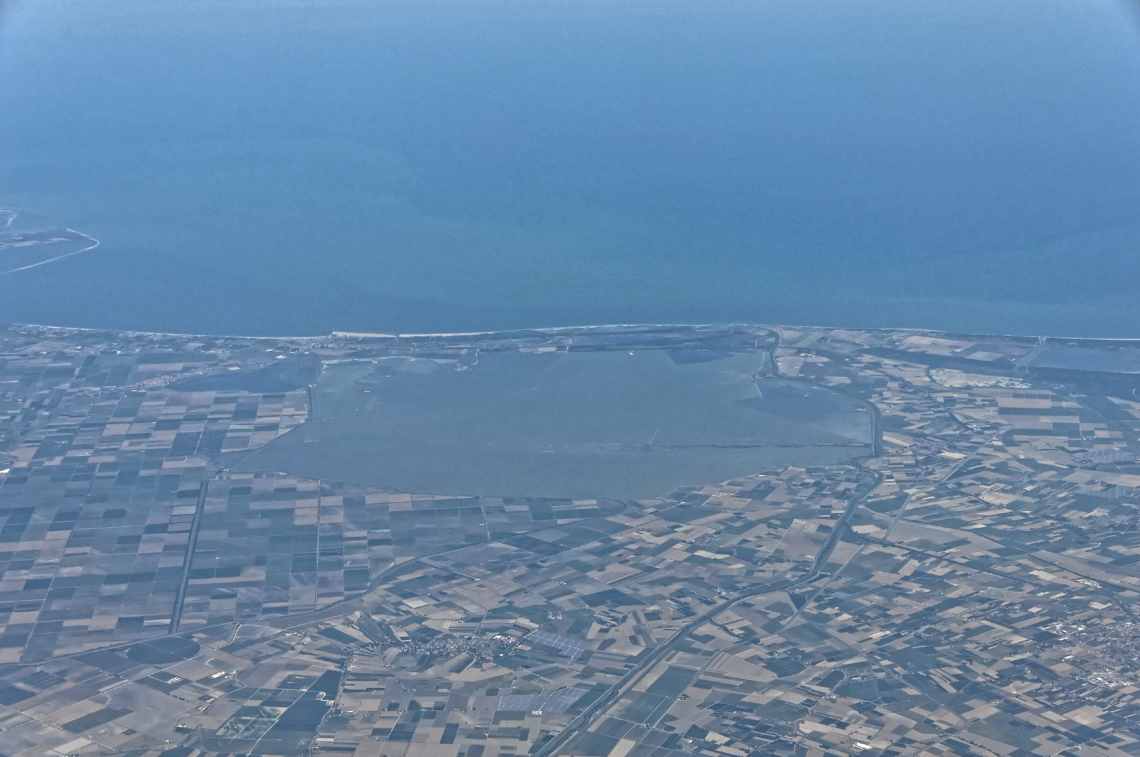 Bilder vom Flug -Rom-Düsseldorf-Hamburg 2013 Dieses Foto entstand in Zusammenarbeit mit Stadtbesichtigungen.de Die Seiten Stadtbesichtigungen.de, der dazugehörige Reise Blog sowie die Facebookseite: Stadtbesichtigungen Rom dürfen dieses Bild für Ihre Veröffentlichungen ohne den Hinweis auf Wikipedia, Commons bzw der Lizenz verwenden. Die Verantwortlichen habe von mir (Ra Boe) die Originaldaten zur freien Verfügung übermittelt bekommen.